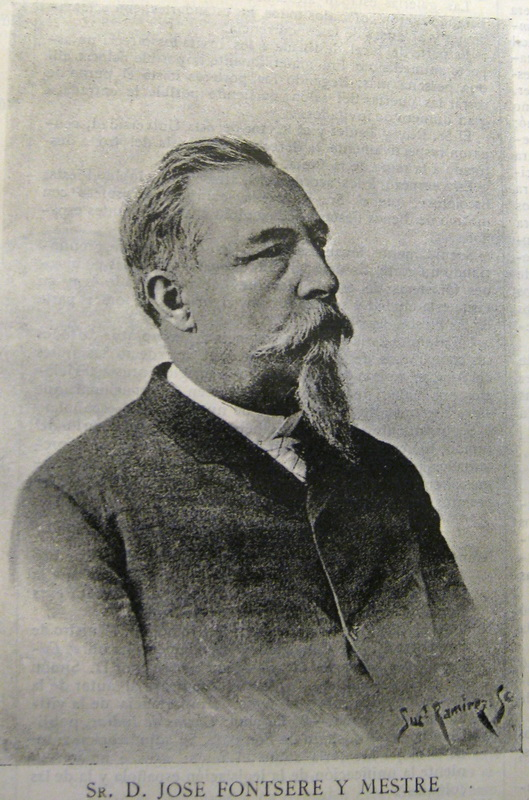 Imatge de Josep Fontseré i Mestre (Barcelona, 1829 - 1897), Arquitecte. Dissenyador del Parc de la Ciutadella per a l'exposició universal de 1888 (Barcelona).